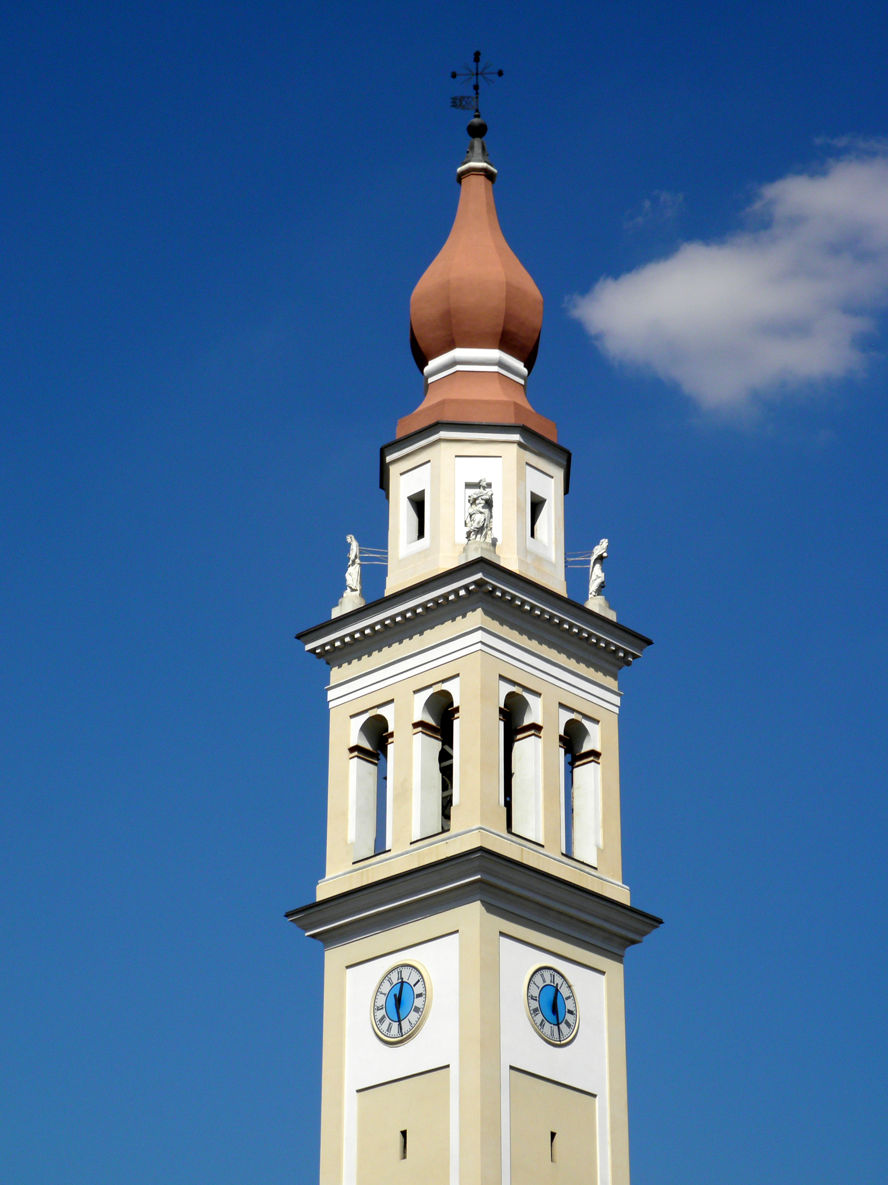 Fiesso Umbertiano, il campanile della chiesa parrocchiale della Natività della Beata Vergine Maria.